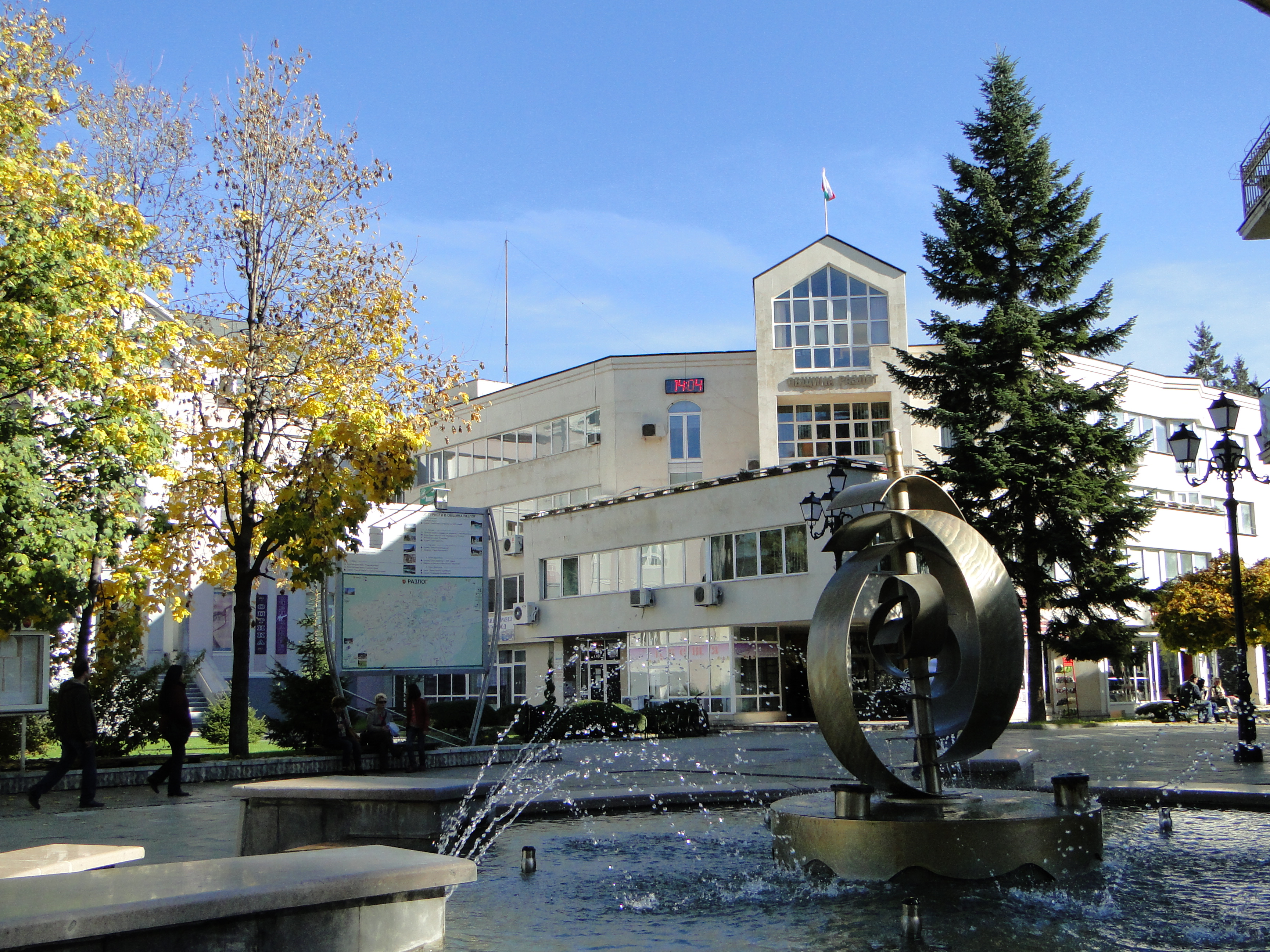 Разлог 2012 November